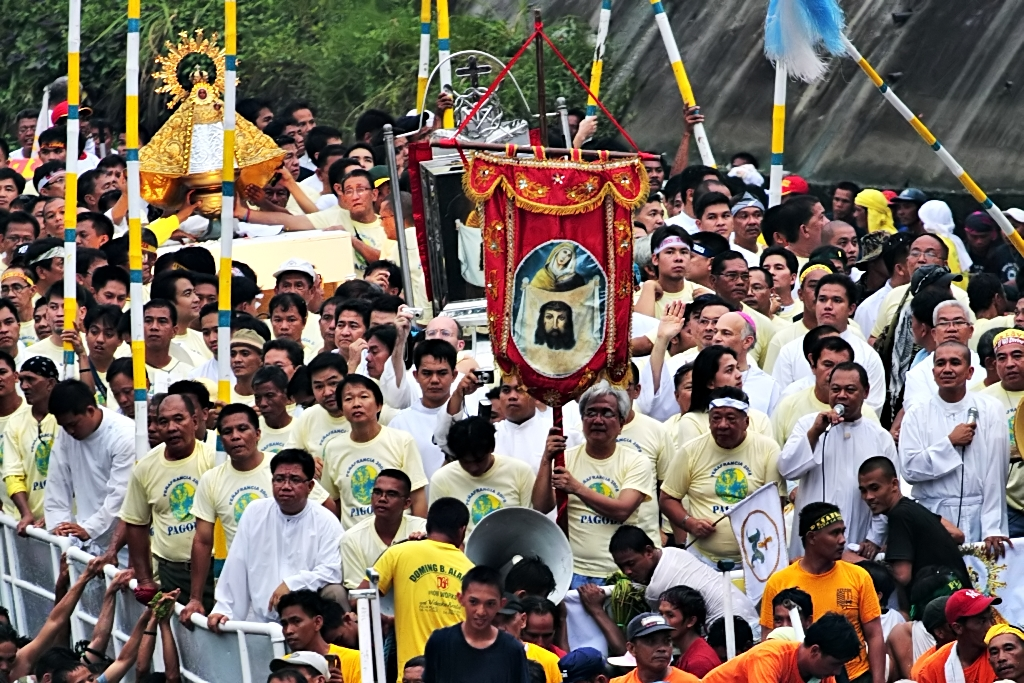 Peñafrancia Fluvial Parade near Magsaysay Bridge, Naga City